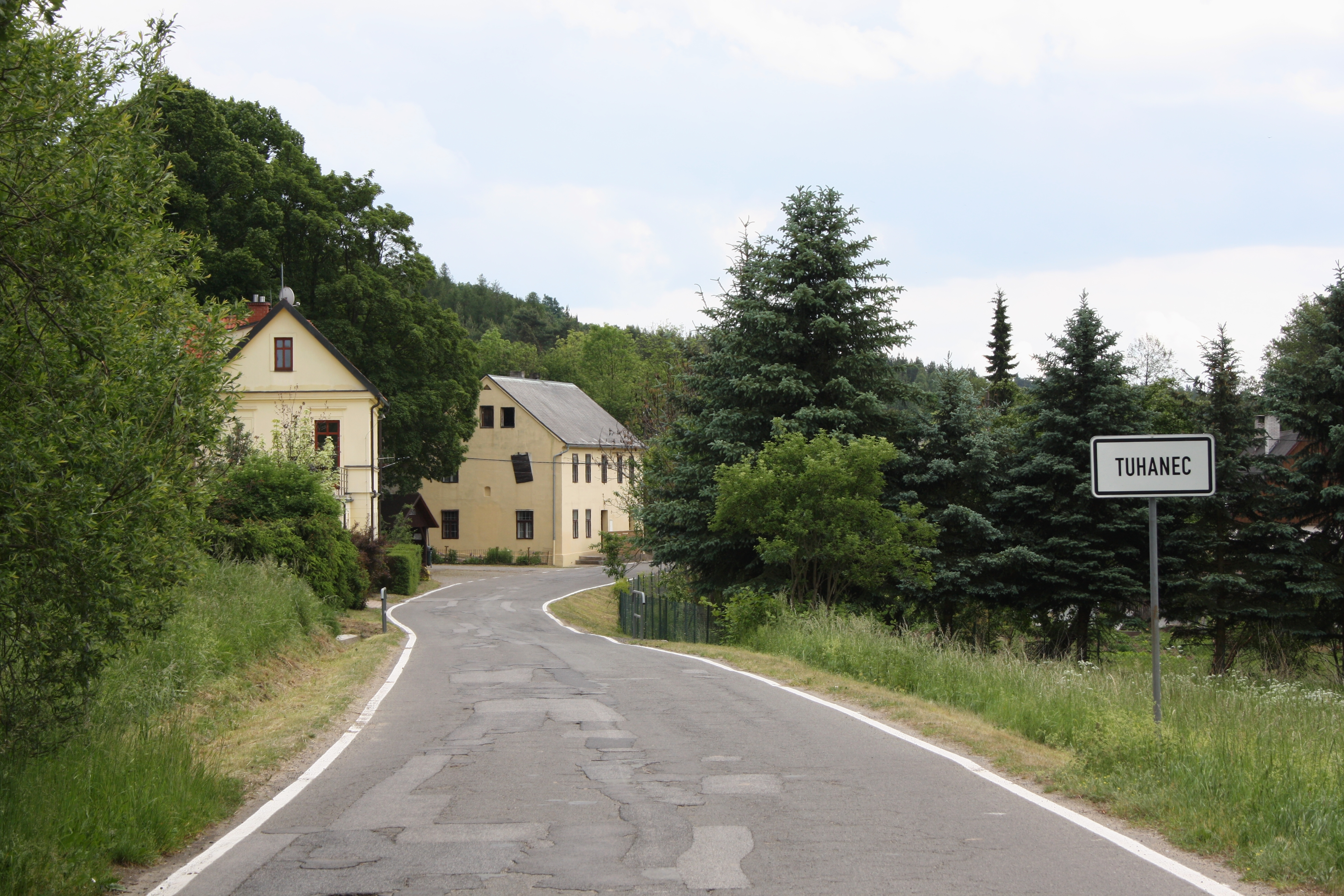 Tuhanec